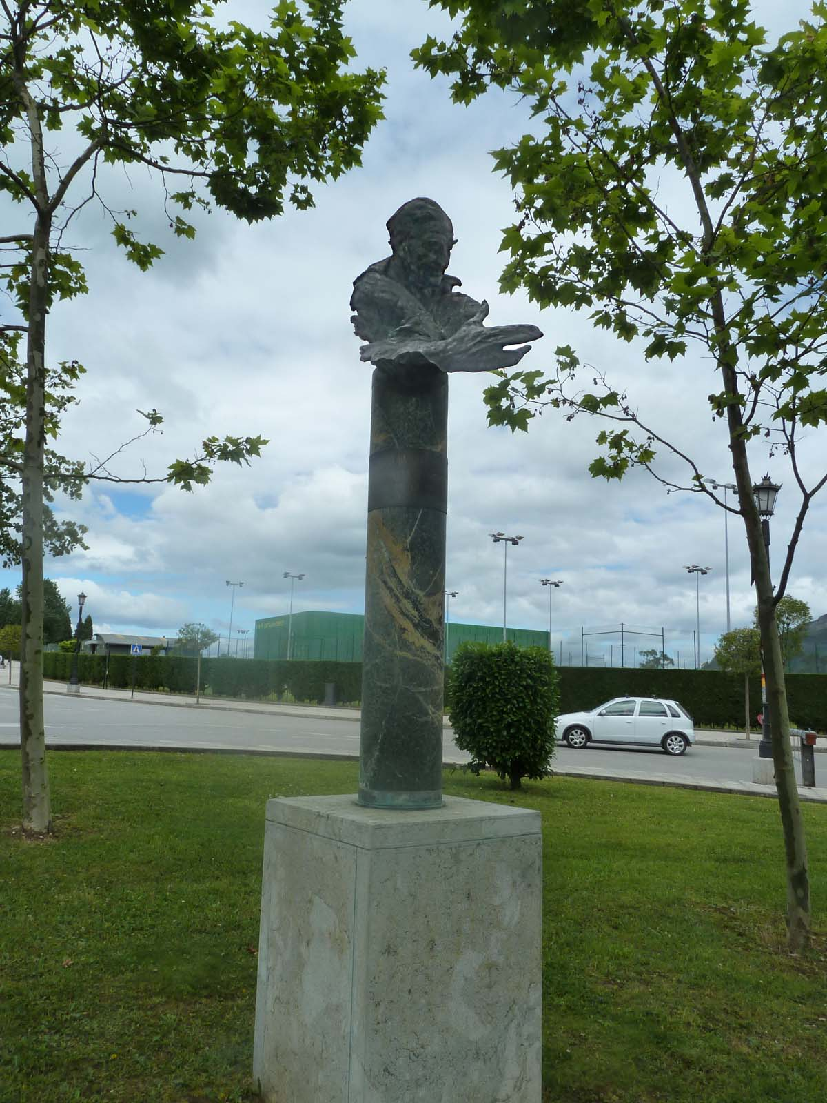 Oviedo